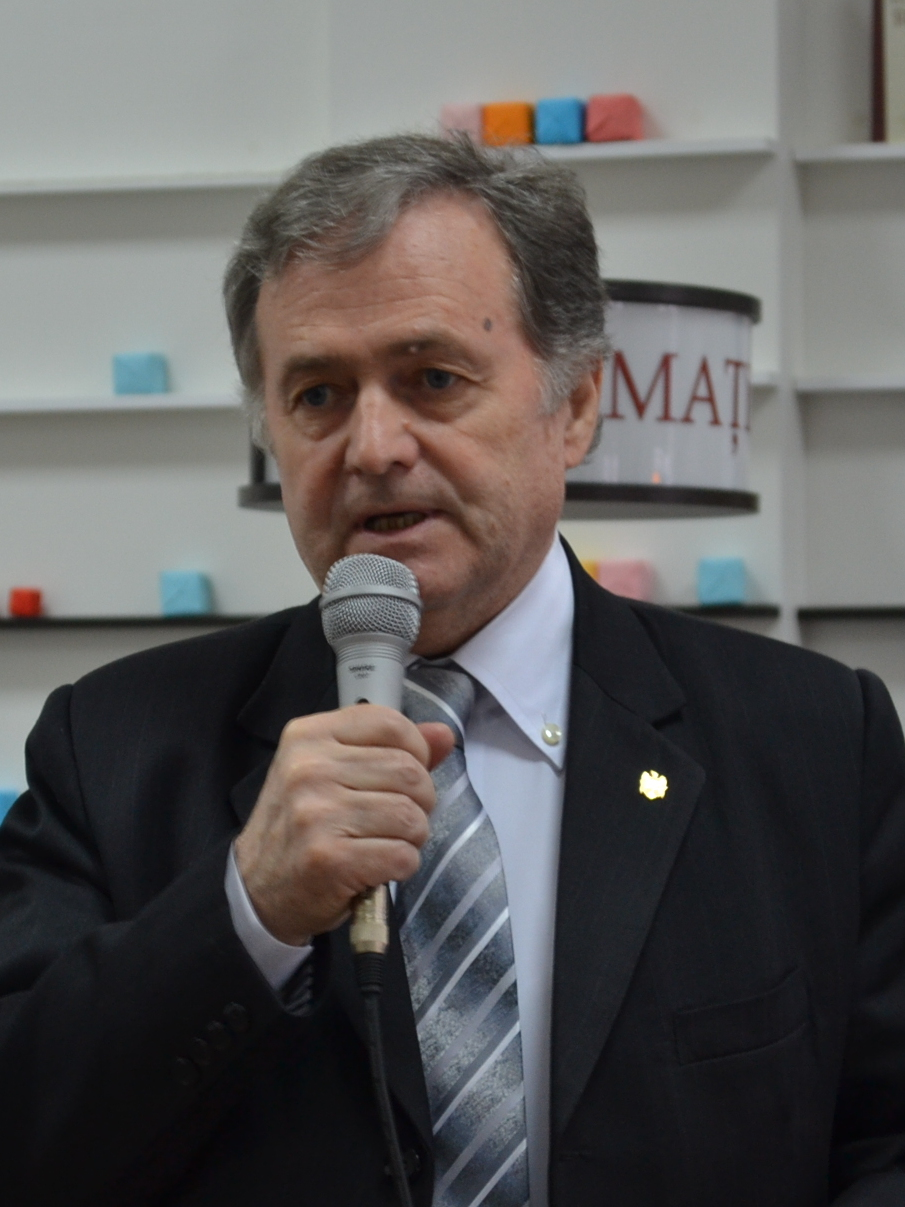 Lansarea cărții „Chișinăul din inima noastră”, de Iurie Colesnic. Biblioteca Centrală, 28.02.2014.